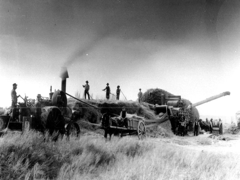 Grupo de hombres (en su mayoría galeses) ocupados en la tarea de la trilla en el valle del Chubut, hacia principios del siglo XX